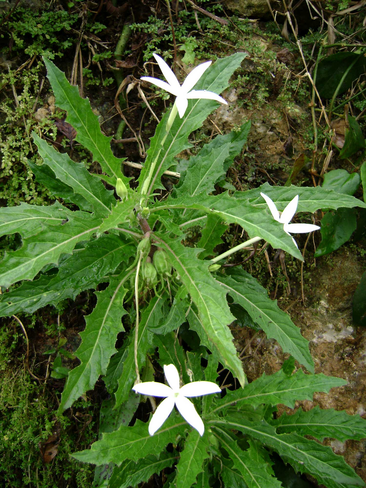 Hippobroma longiflora; in Tonga